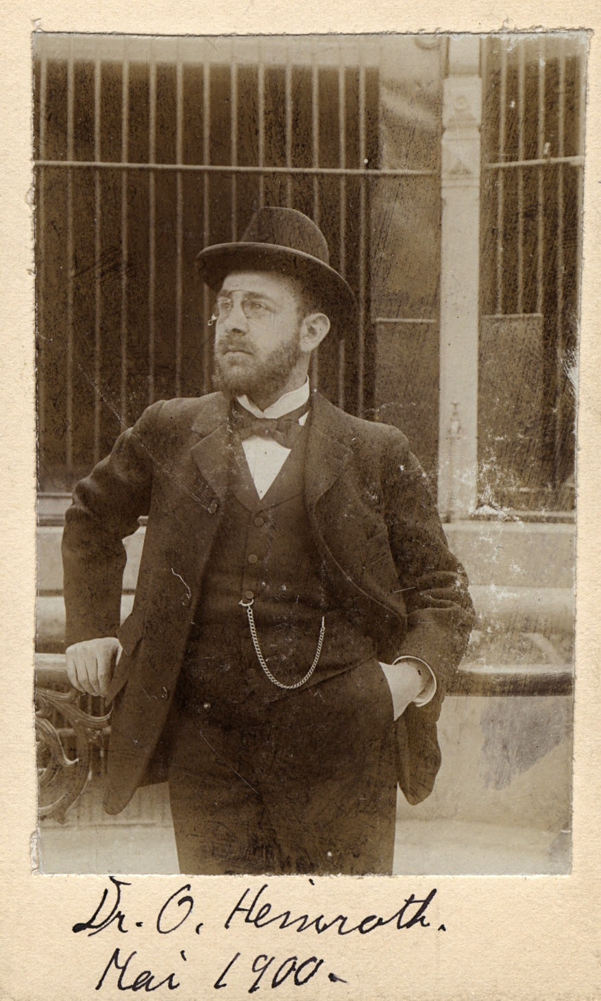 Oskar Heinroth (1 March 1871 – 31 May 1945)